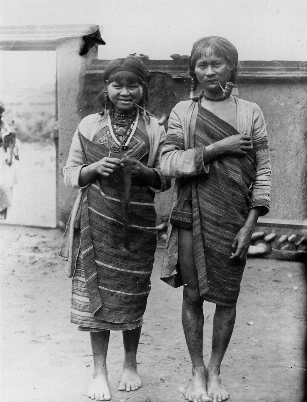 鳥居龍藏所攝紋面泰雅族女人